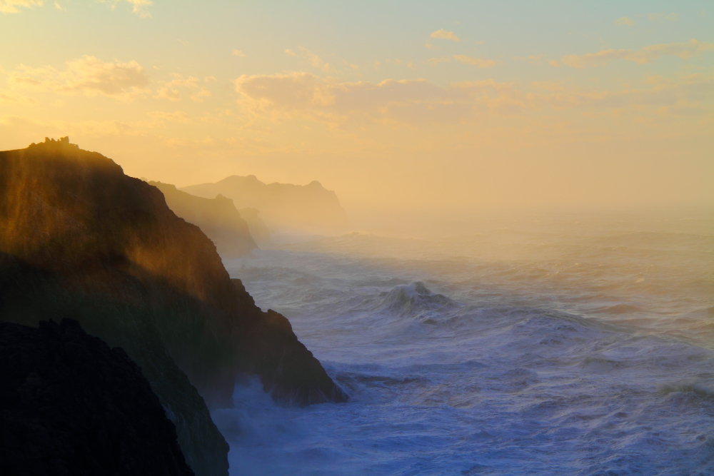 Acantilados en la localidad cántabra de Toñanes, Alfoz de Lloredo (España)